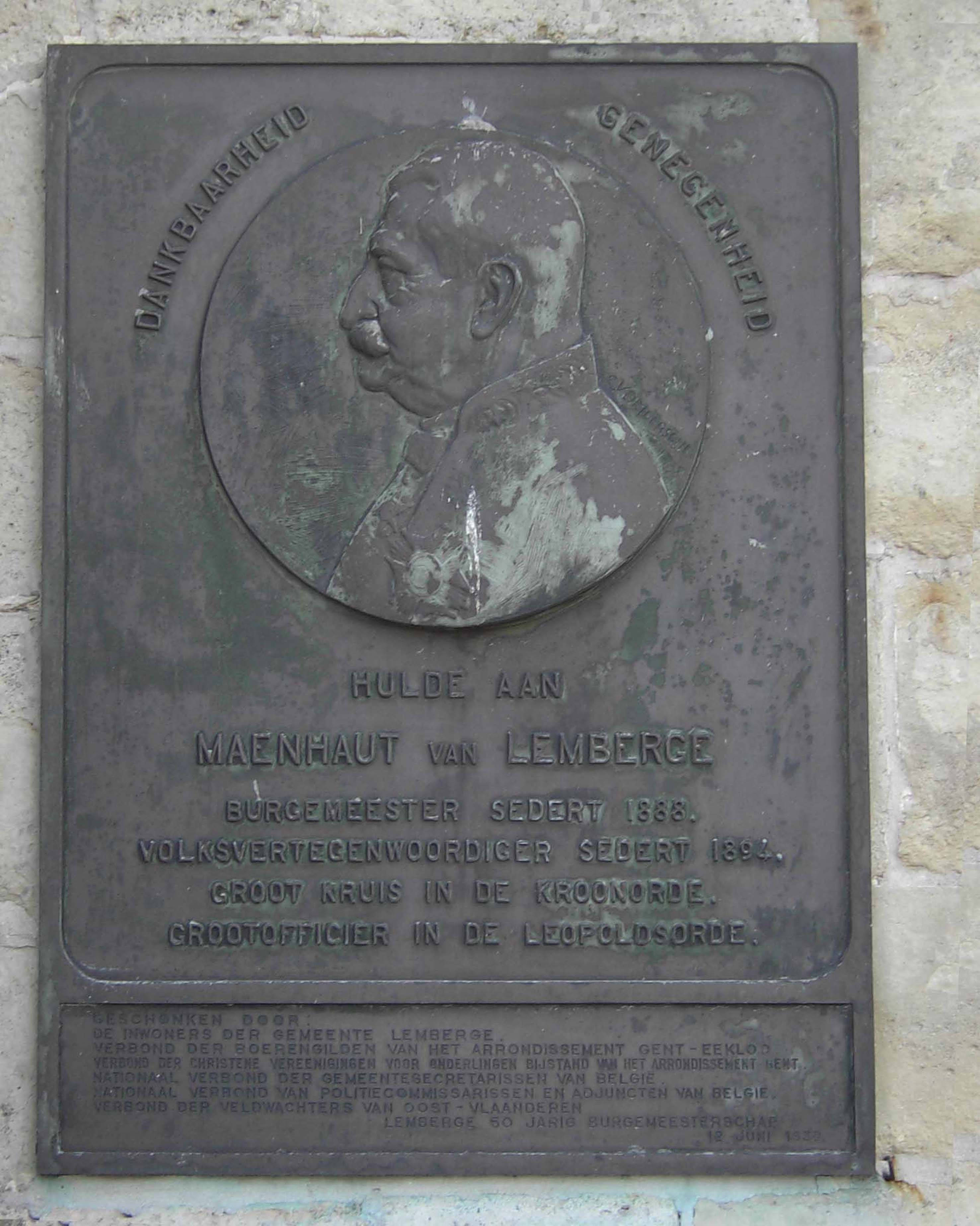 Lemberge - Hulde aan de burgemeester voor zijn 50 jaar ambt. Hangt links van de kerkdeur van Lemberge (Merelbeke). 12 juni 1939.